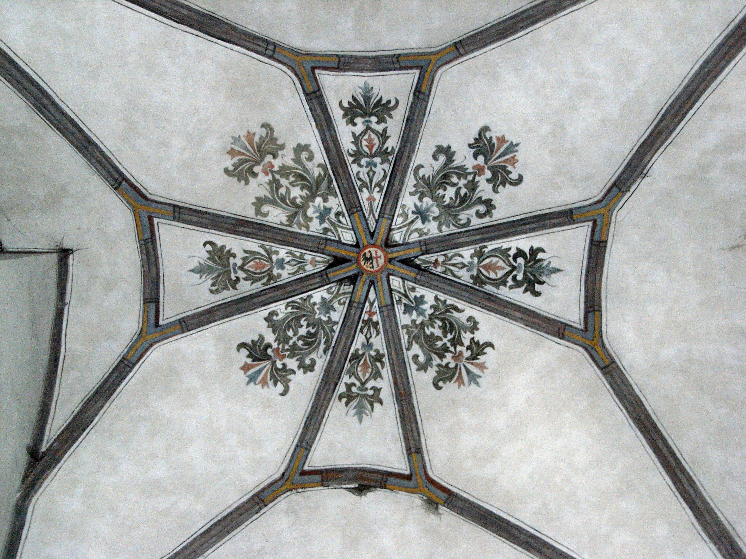 Unser Frauen in Memmingen